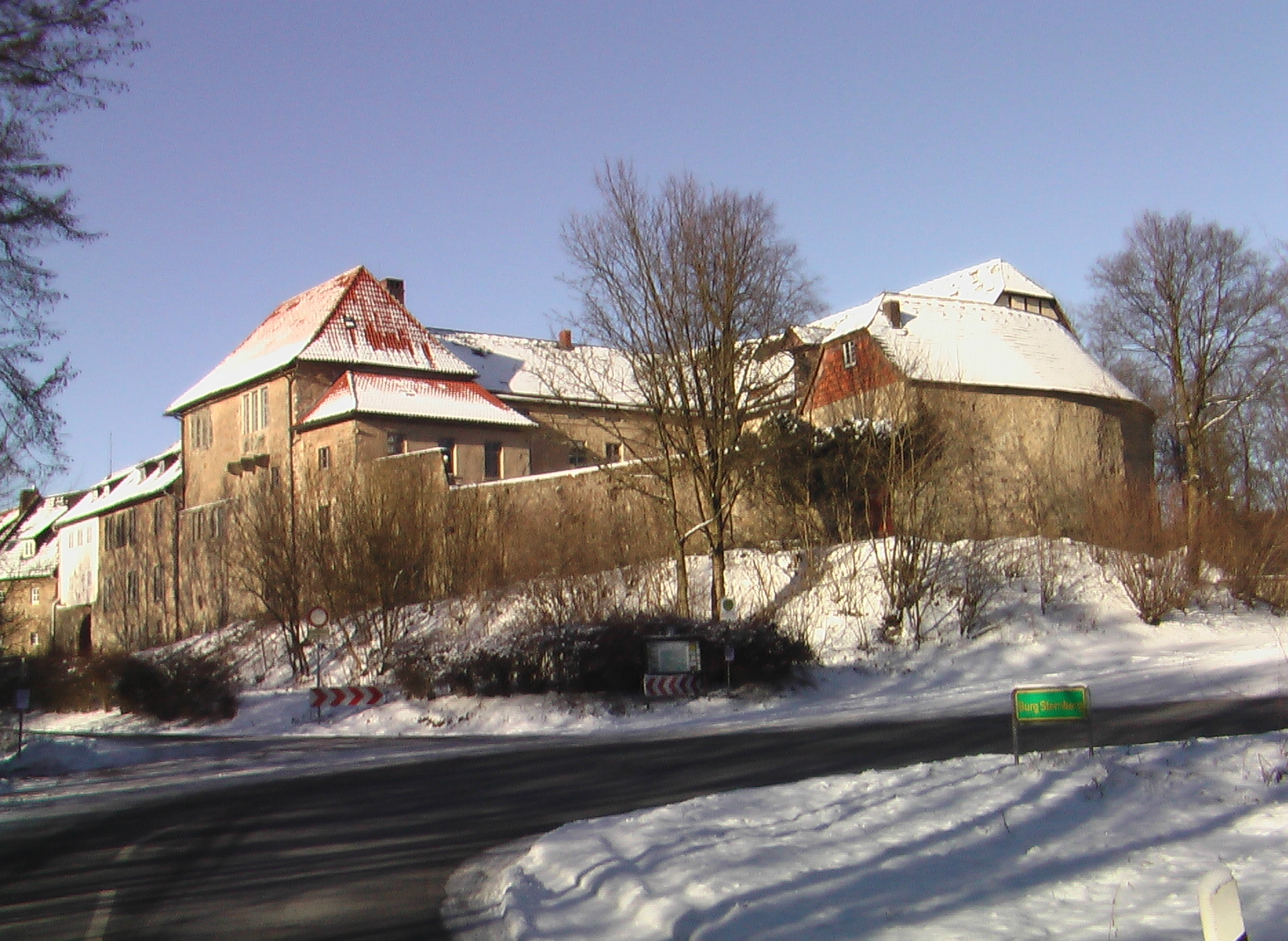 Außenansicht Burg Sternberg von Südwesten